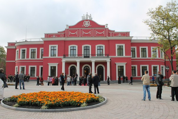 Оновлений театр імені Кропивницького в Кіровограді (ззовні)